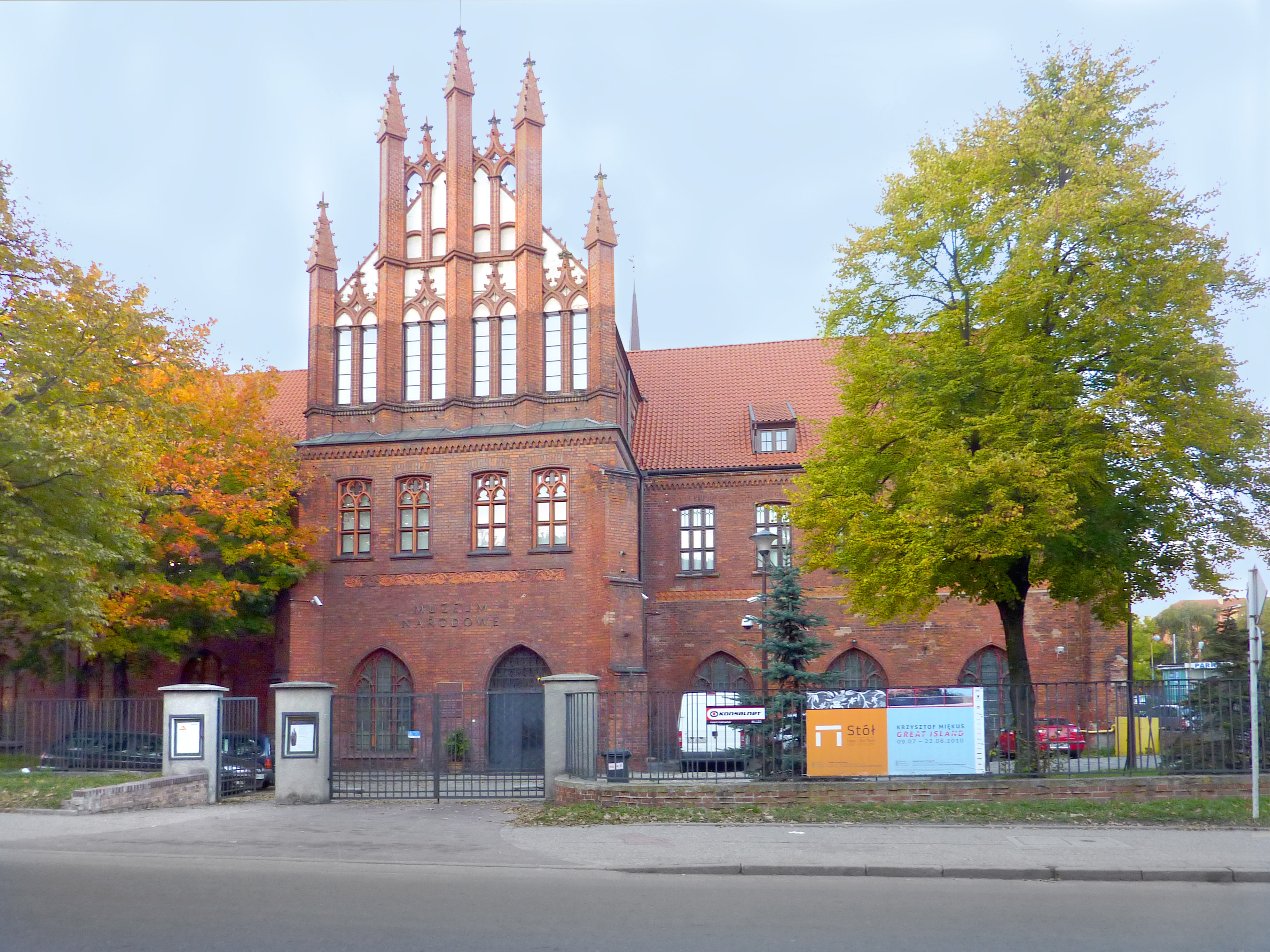 Muzeum Narodowe w Gdańsku. Widok od strony wejścia głównego od ul. Toruńskiej